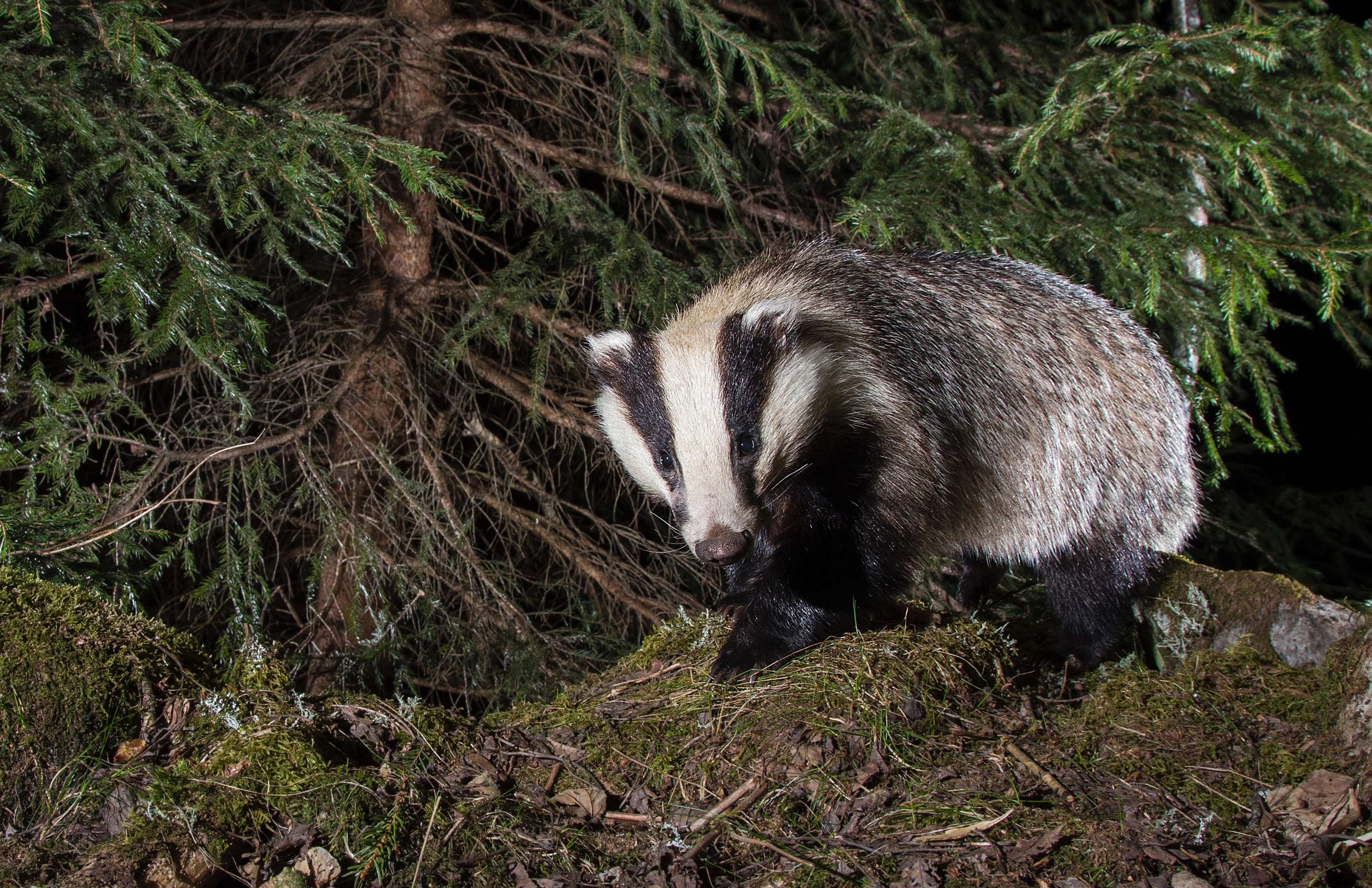 Bildet av grevling tatt i de norske skoger. Dette er tatt med IR-sensor - Hvor grevlingen selv har utløst kamera.